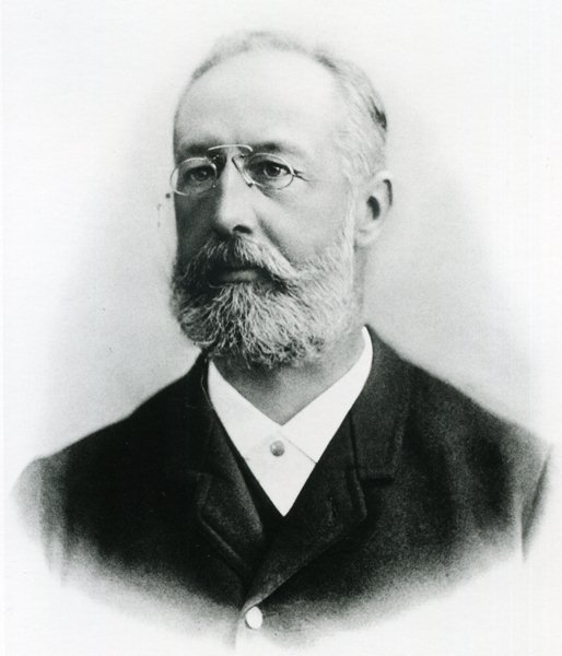 Theophil Studer, Rektor der Universität Bern 1891–1892